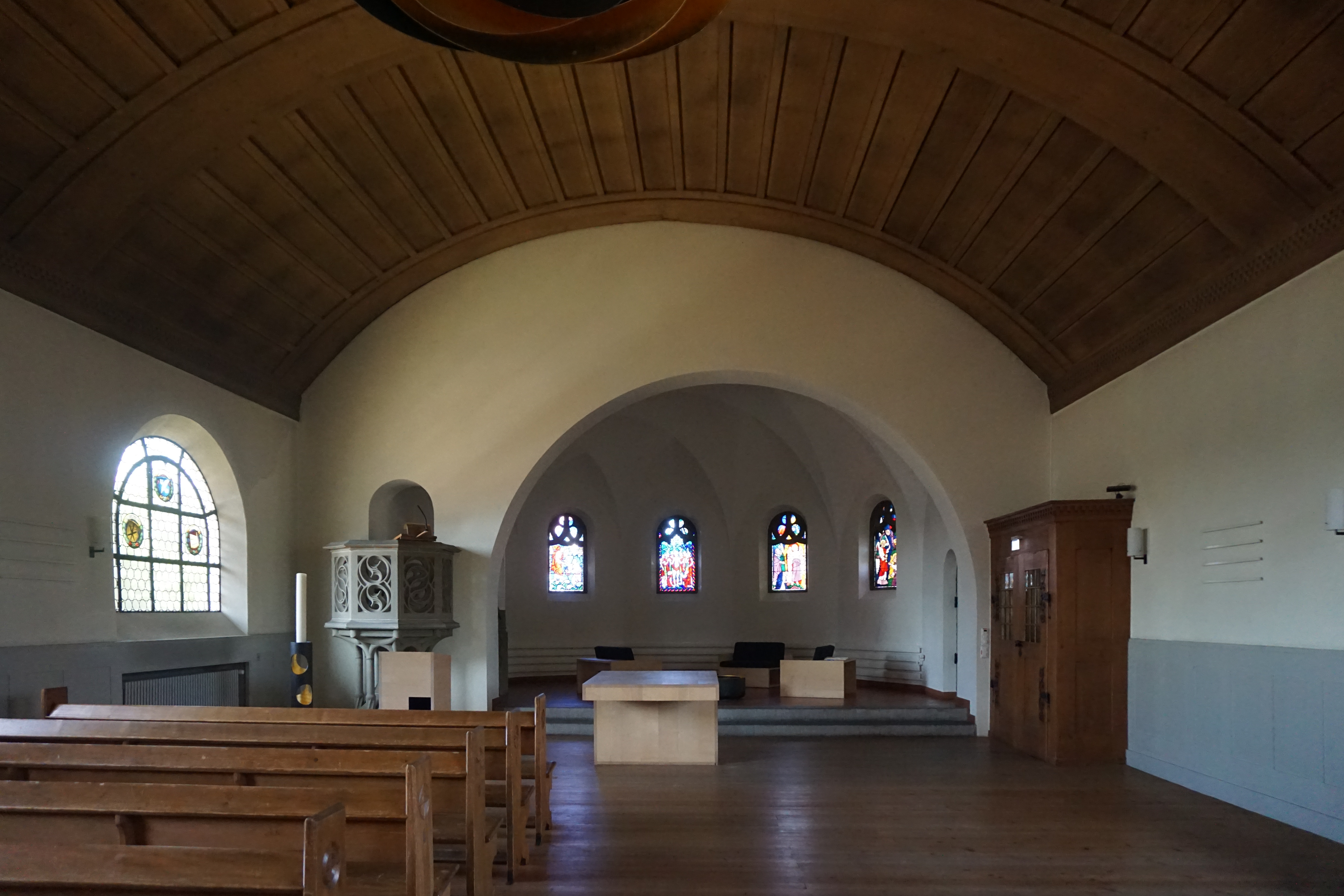 Die Reformierte Kapelle vom Inselspital Bern, Innenraum